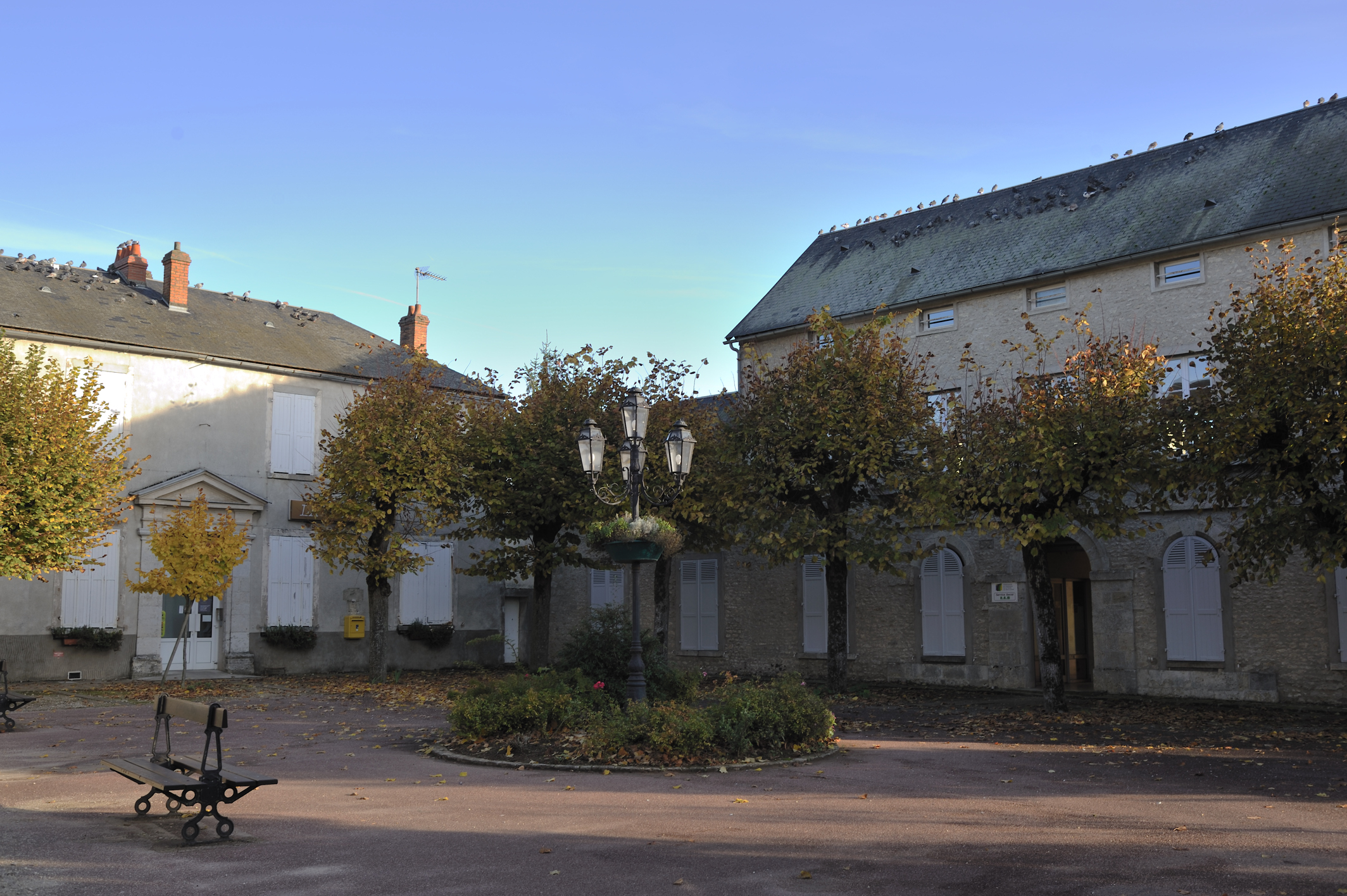 Place du Vieux Marché, Outarville, Loiret, France